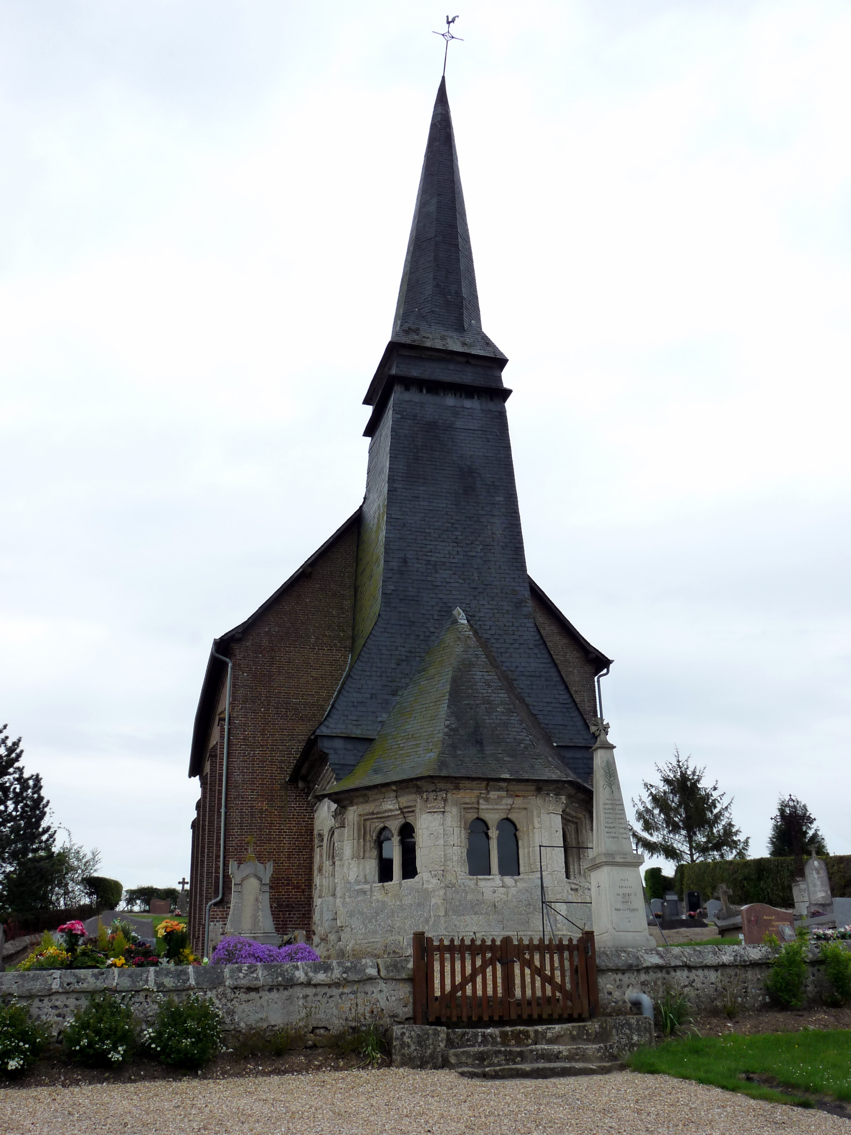 Église Saint-Denis de Rebets (Classé) .